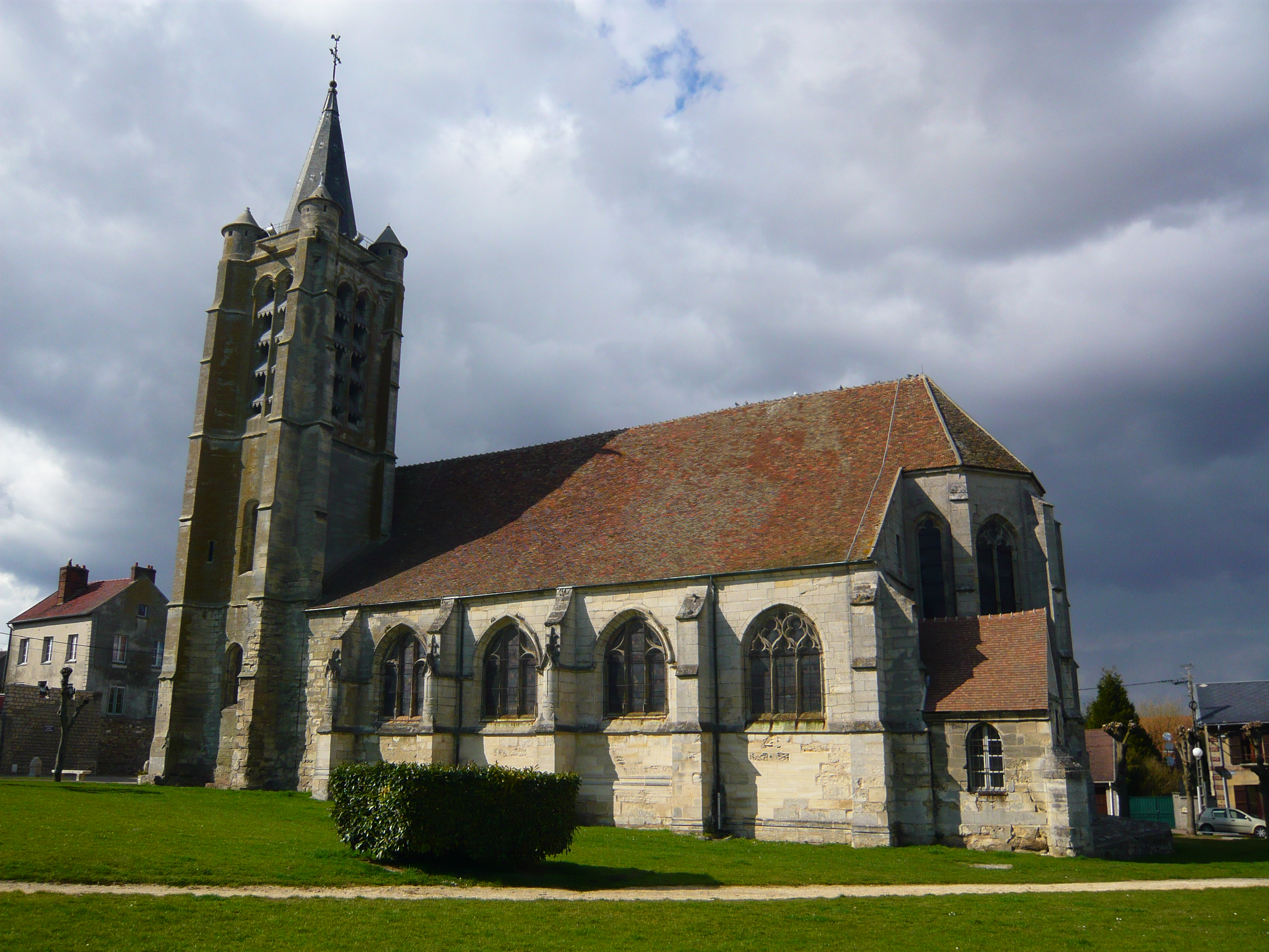 Eglise Saint Martin de Survilliers